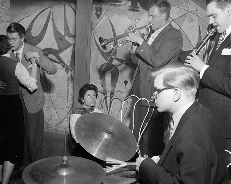 Österlånggatan. Interiör på jazzklubben, Gazell Club